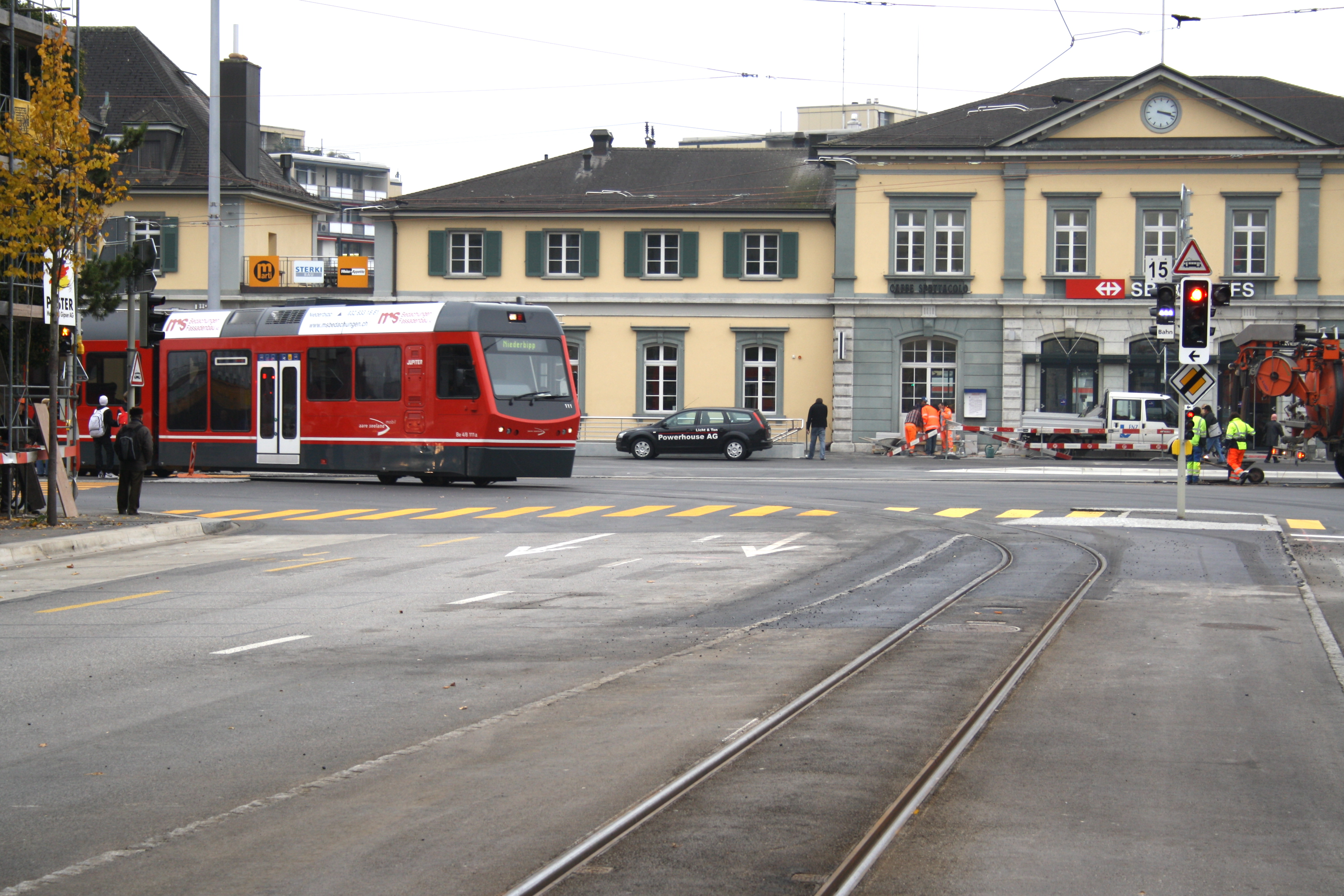 Bahnhfo Solothurn mit Zug nach Niederbipp